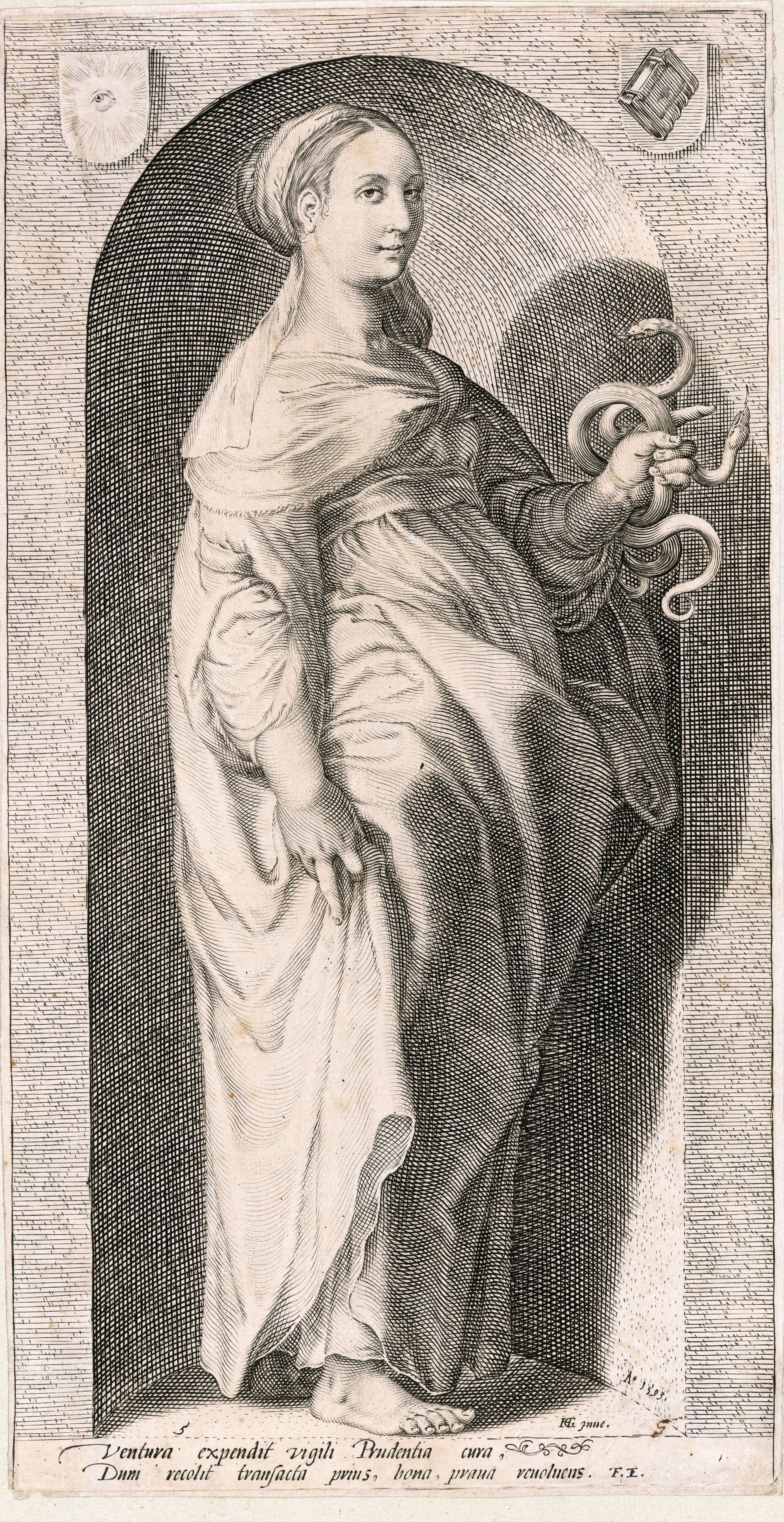 [Prudentia] [Die sieben Tugenden]